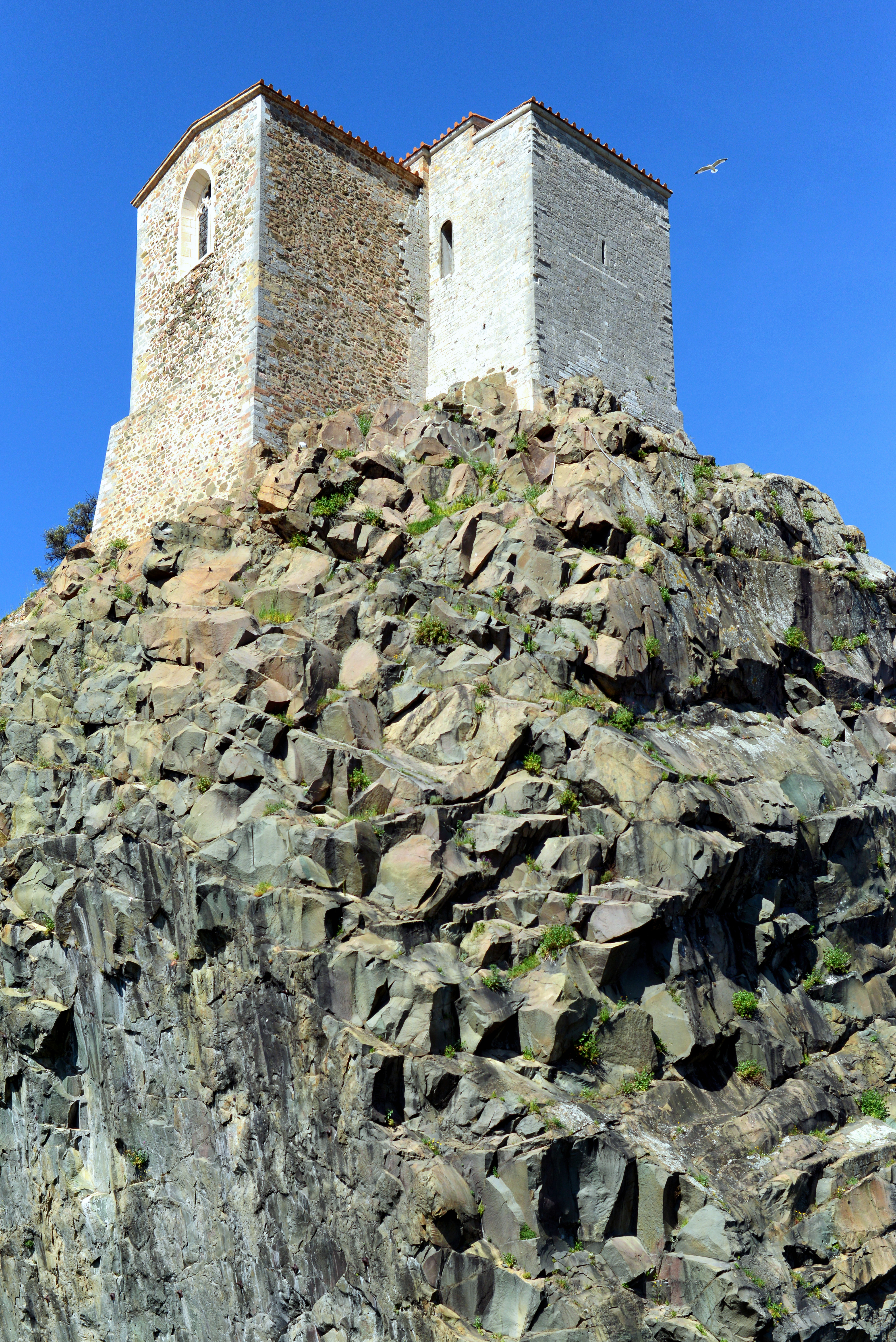 La Garde, Var (Provence) - Ancienne église Notre-Dame du XIIe siècle.